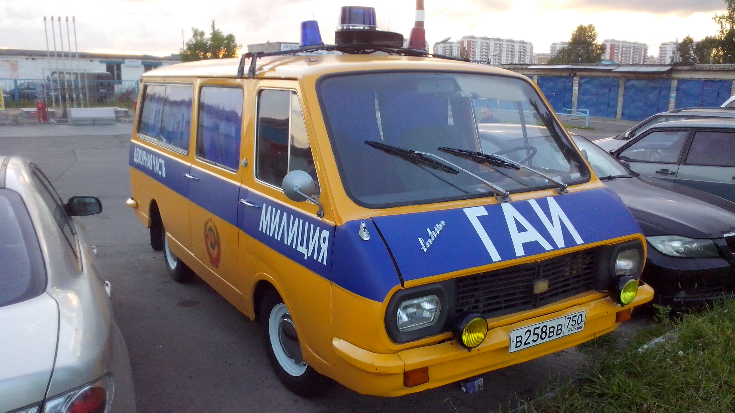 РАФ-2203